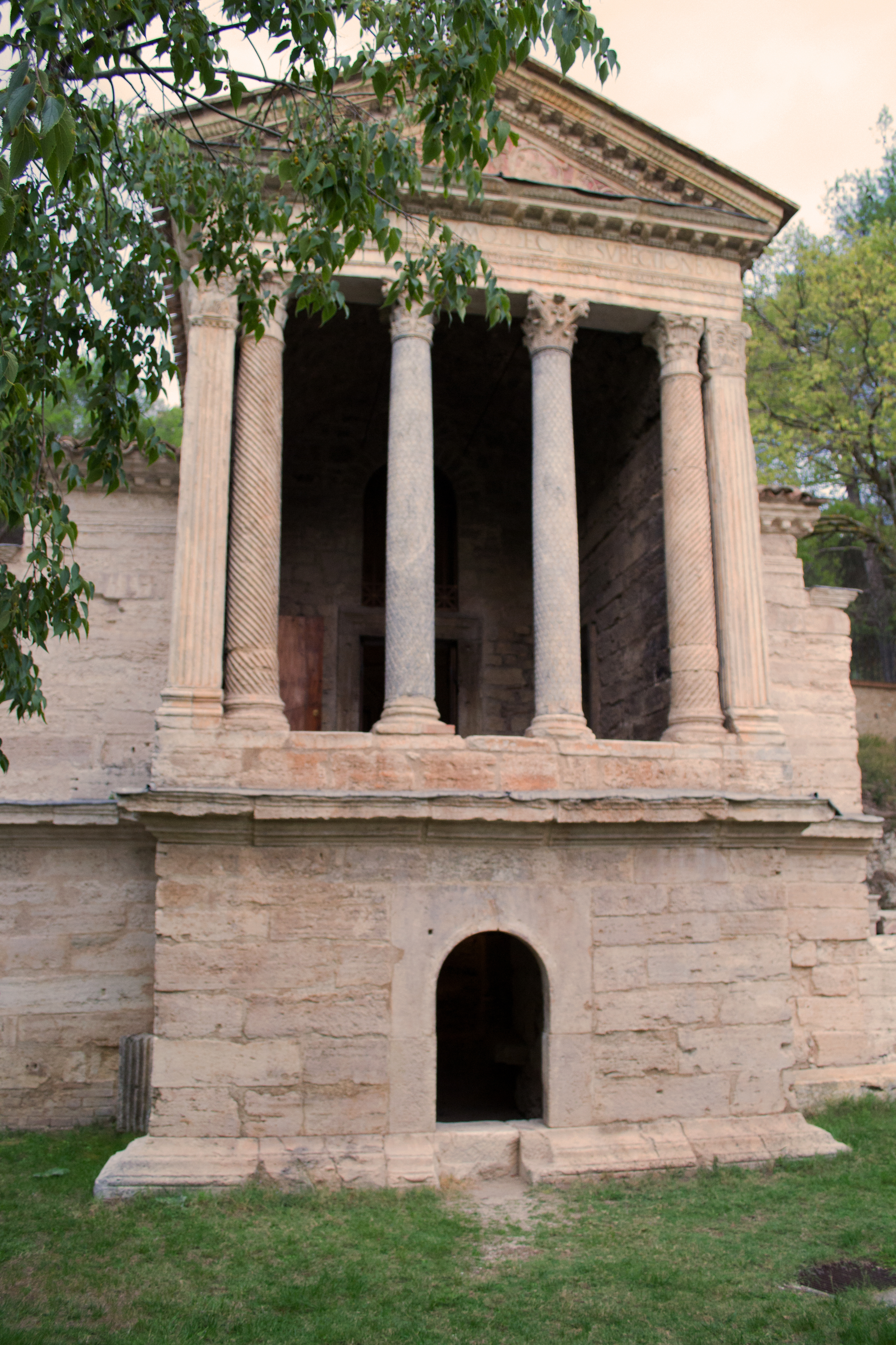 Tempietto del Clitunno - MIBAC This is a photo of a monument which is part of cultural heritage of Italy.